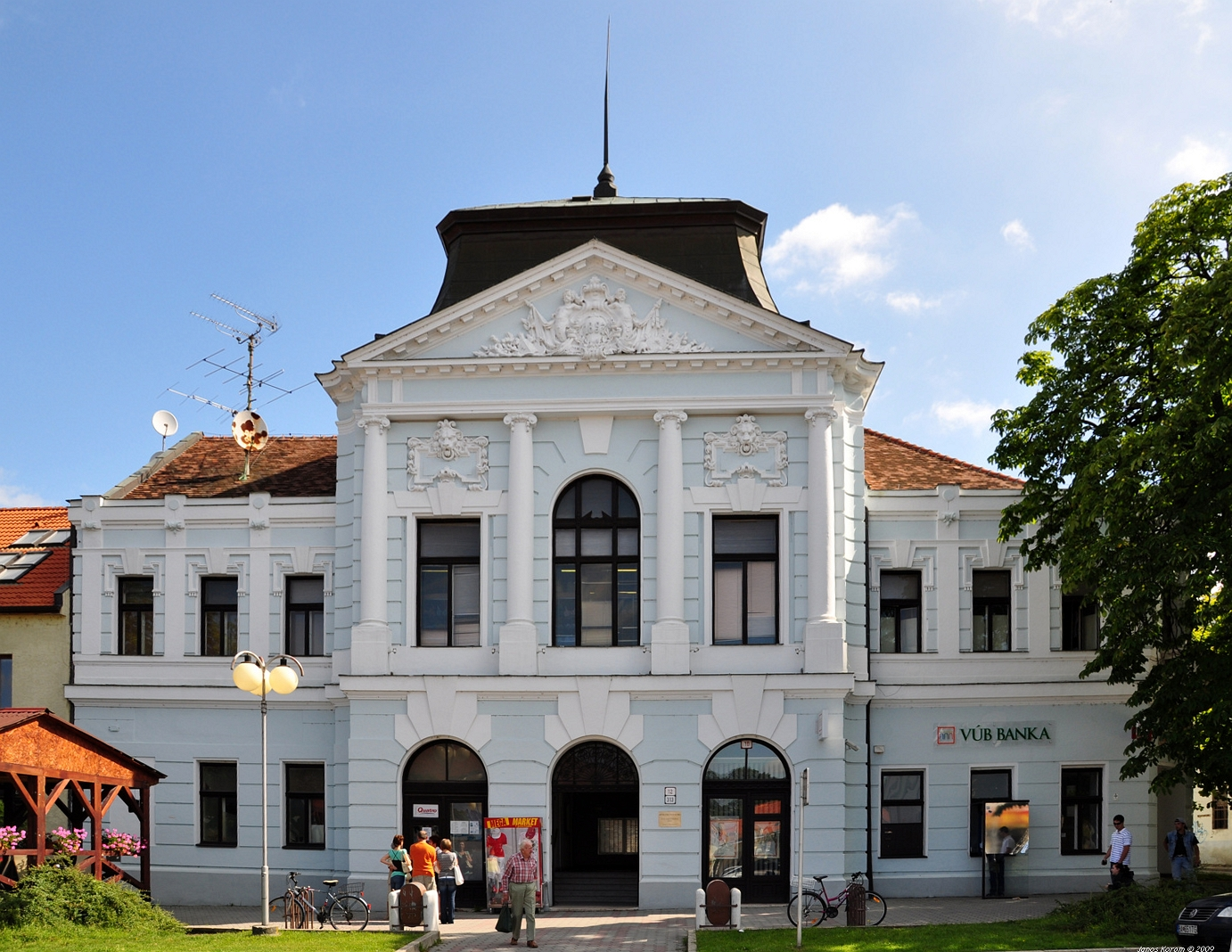 Budova banky ve Zlatých Moravcích, Slovensko